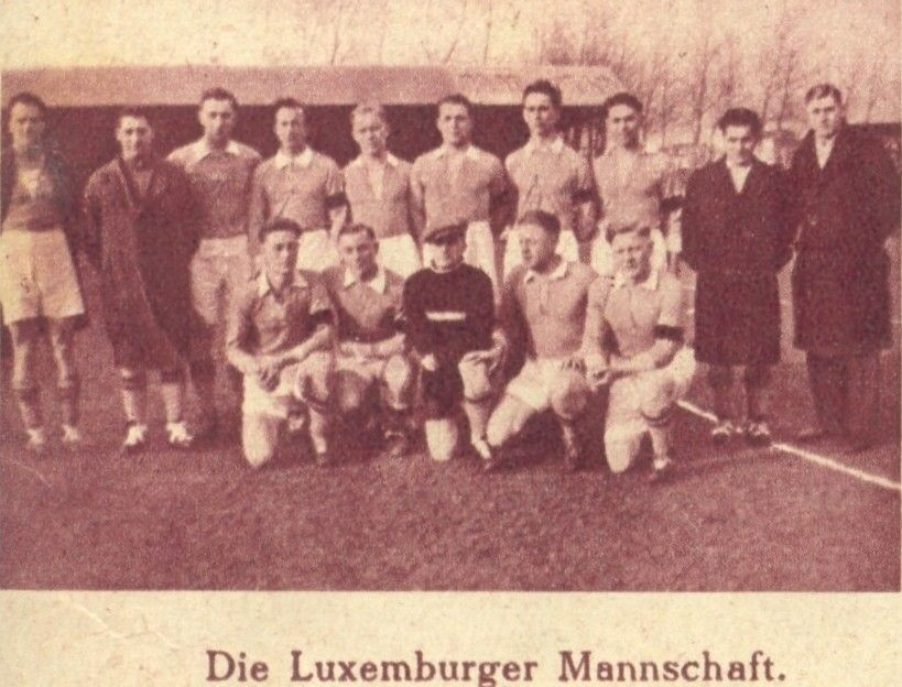 Equipe du Luxembourg en 1934.